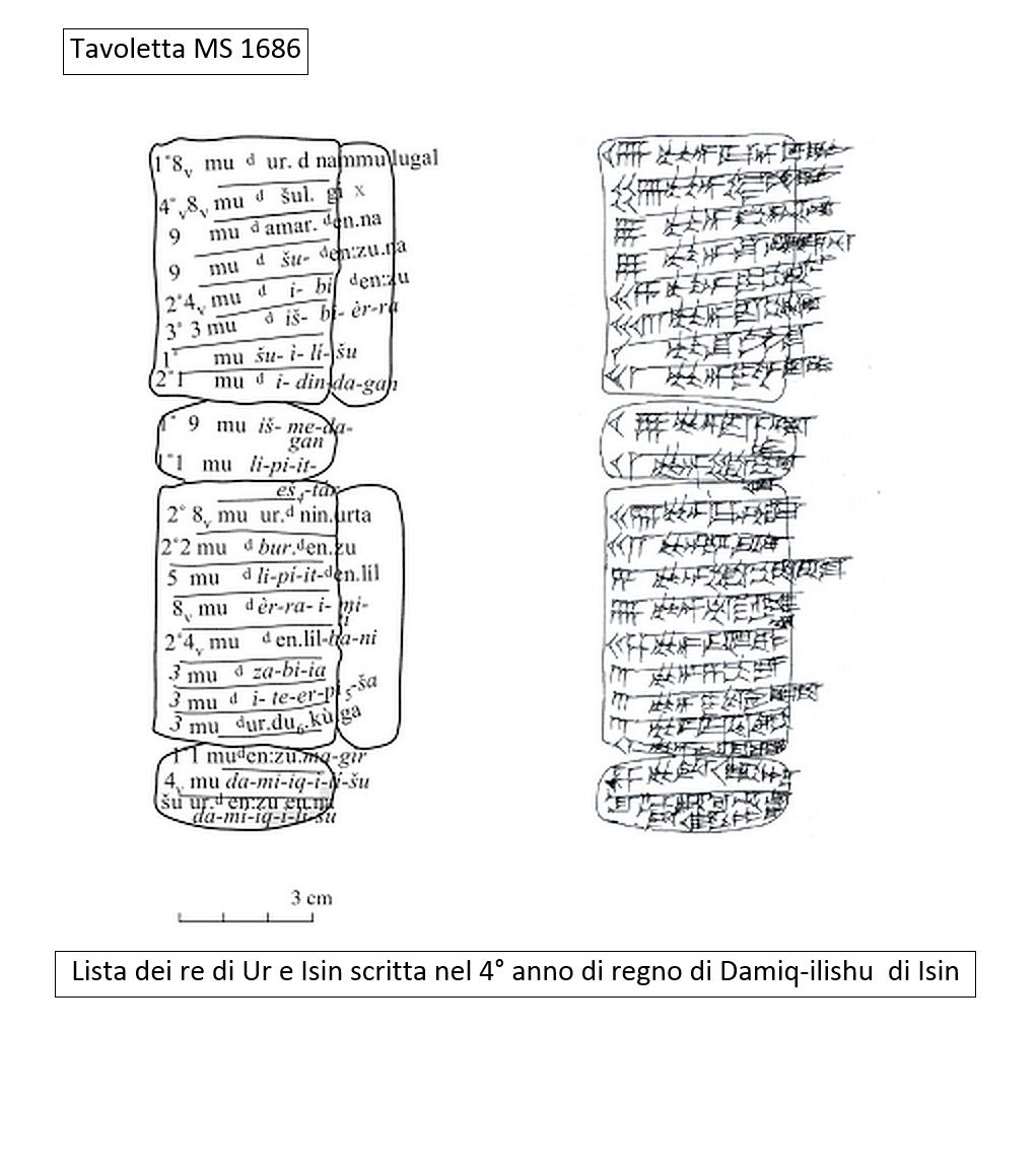 Disegno tavoletta d'argilla MS 1686 - Lista dei re di Ur e Isin